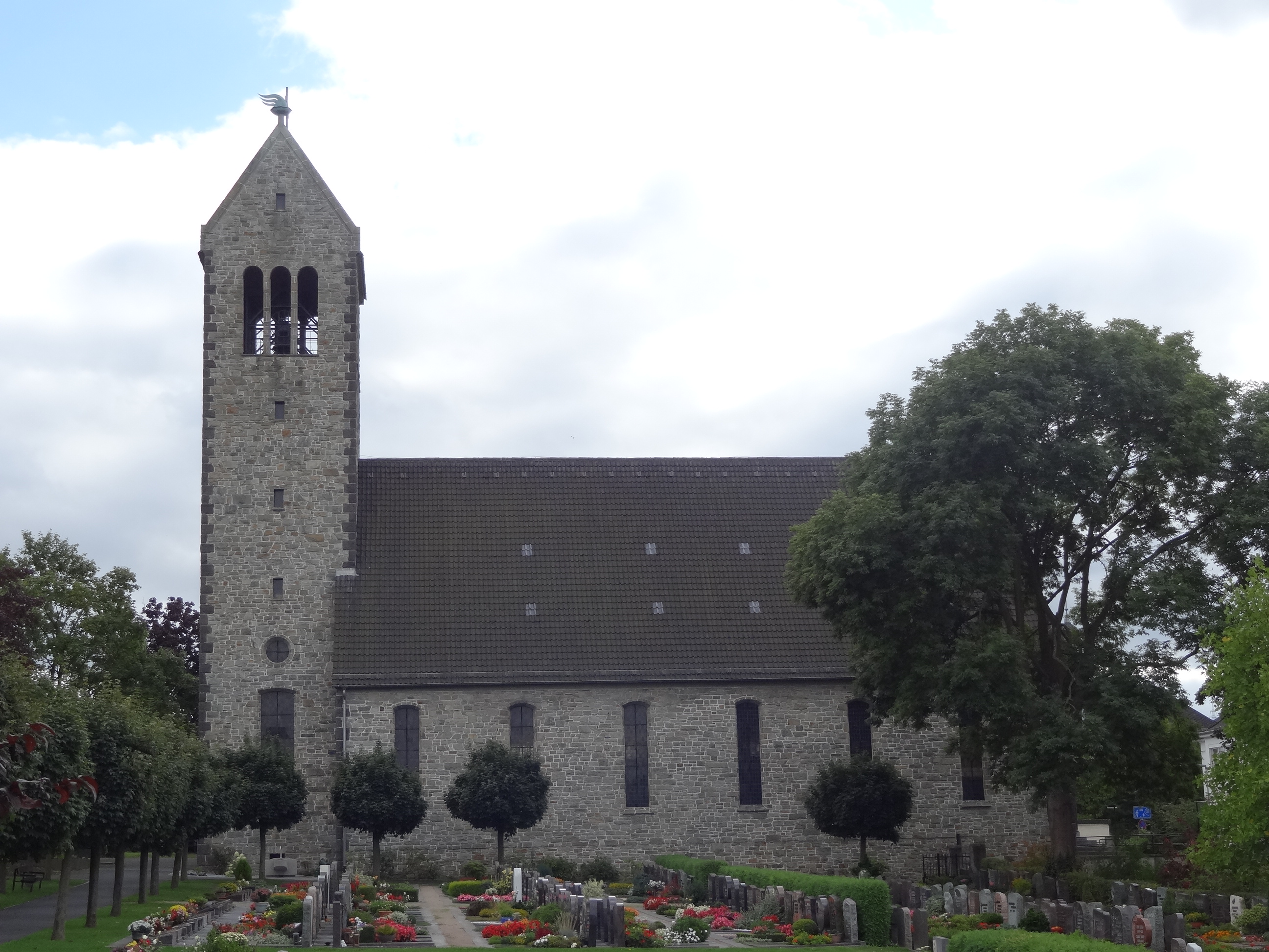 Evangelische Kirche Watzenborn-Steinberg